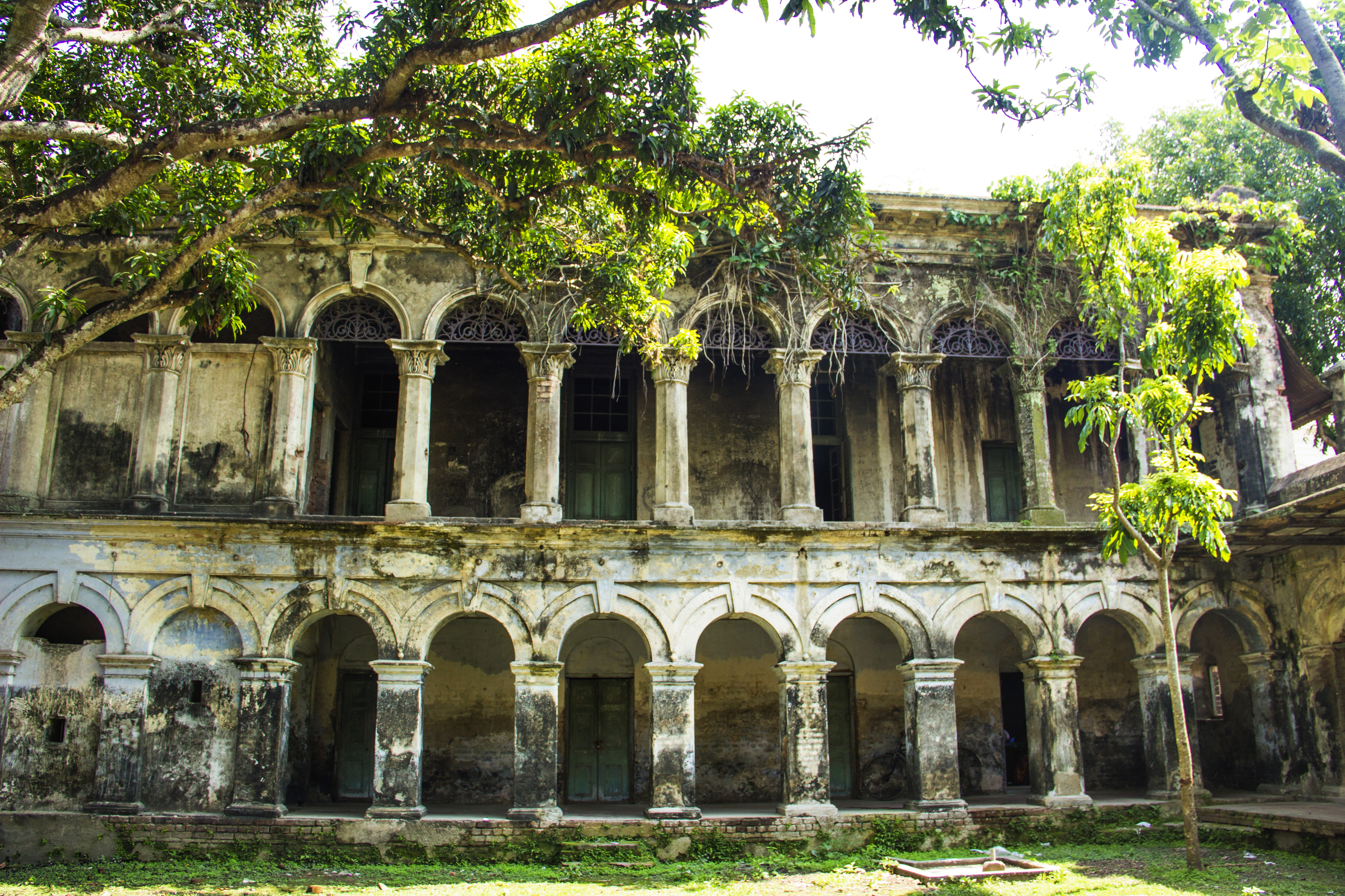 তেওতা জমিদার বাড়ি ভেতরে